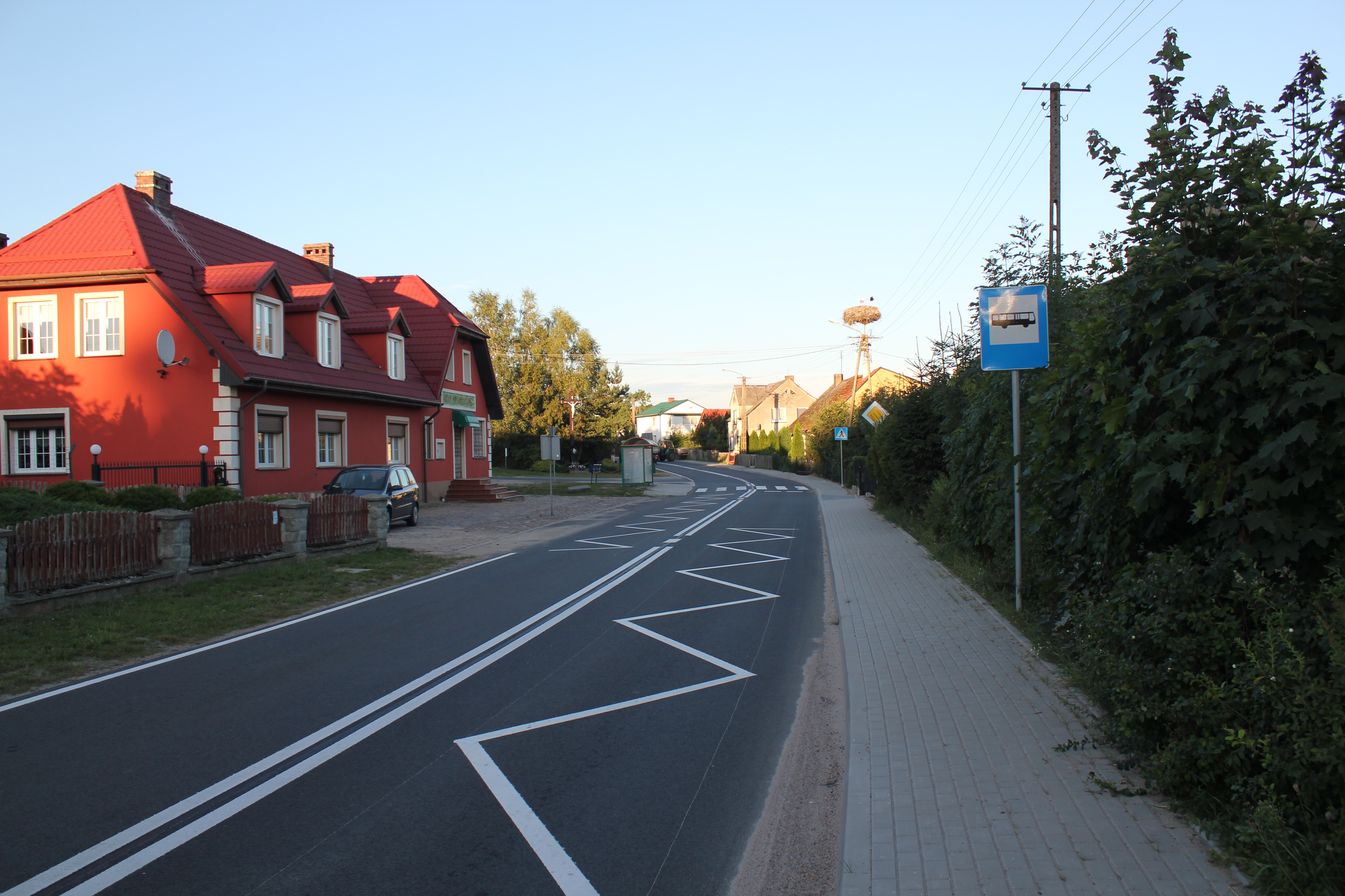 Podole Małe z drogi powiatowej Głobino-Podkomorzyce